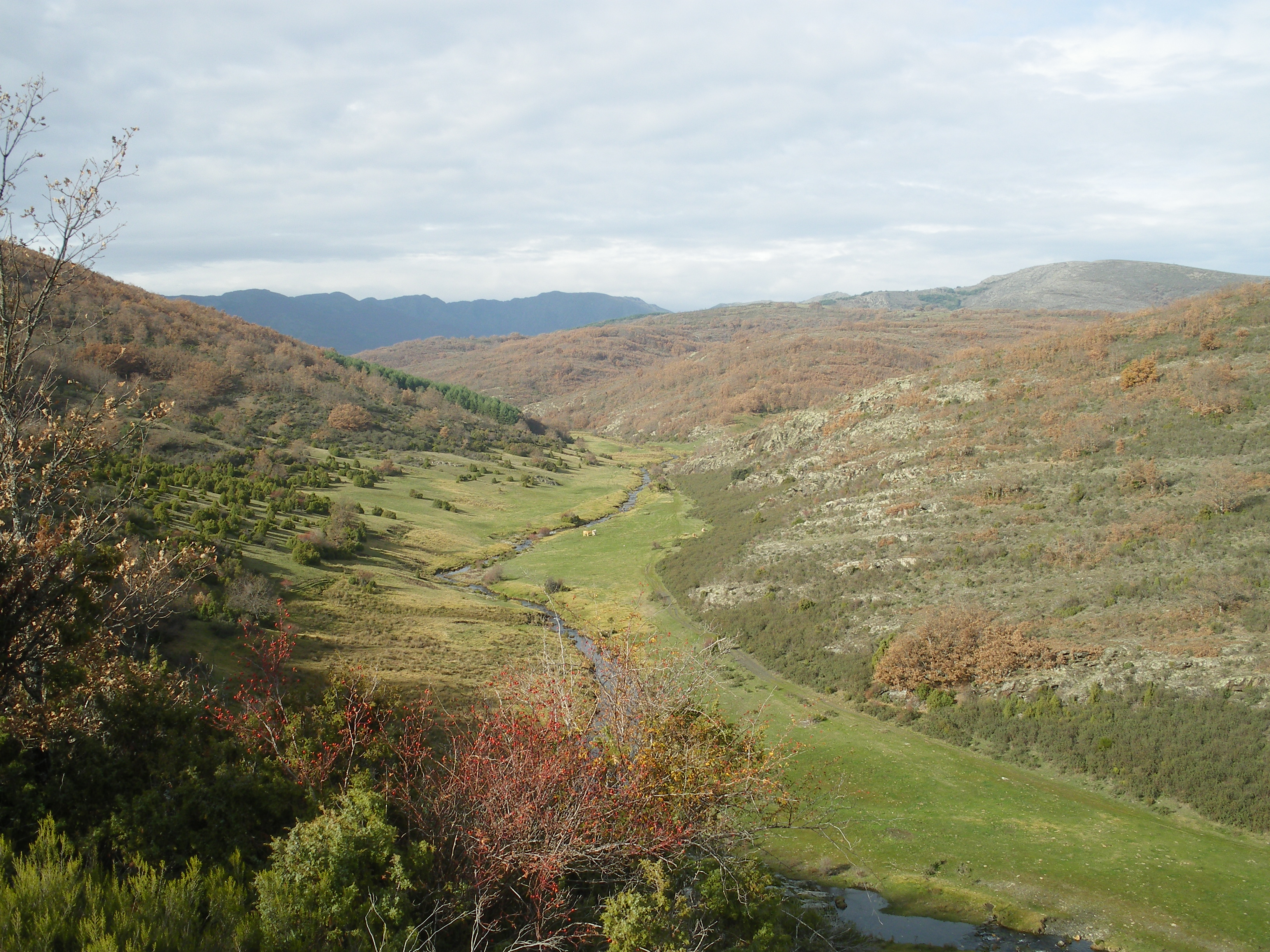 Visitando el Hayedo de Tejera Negra